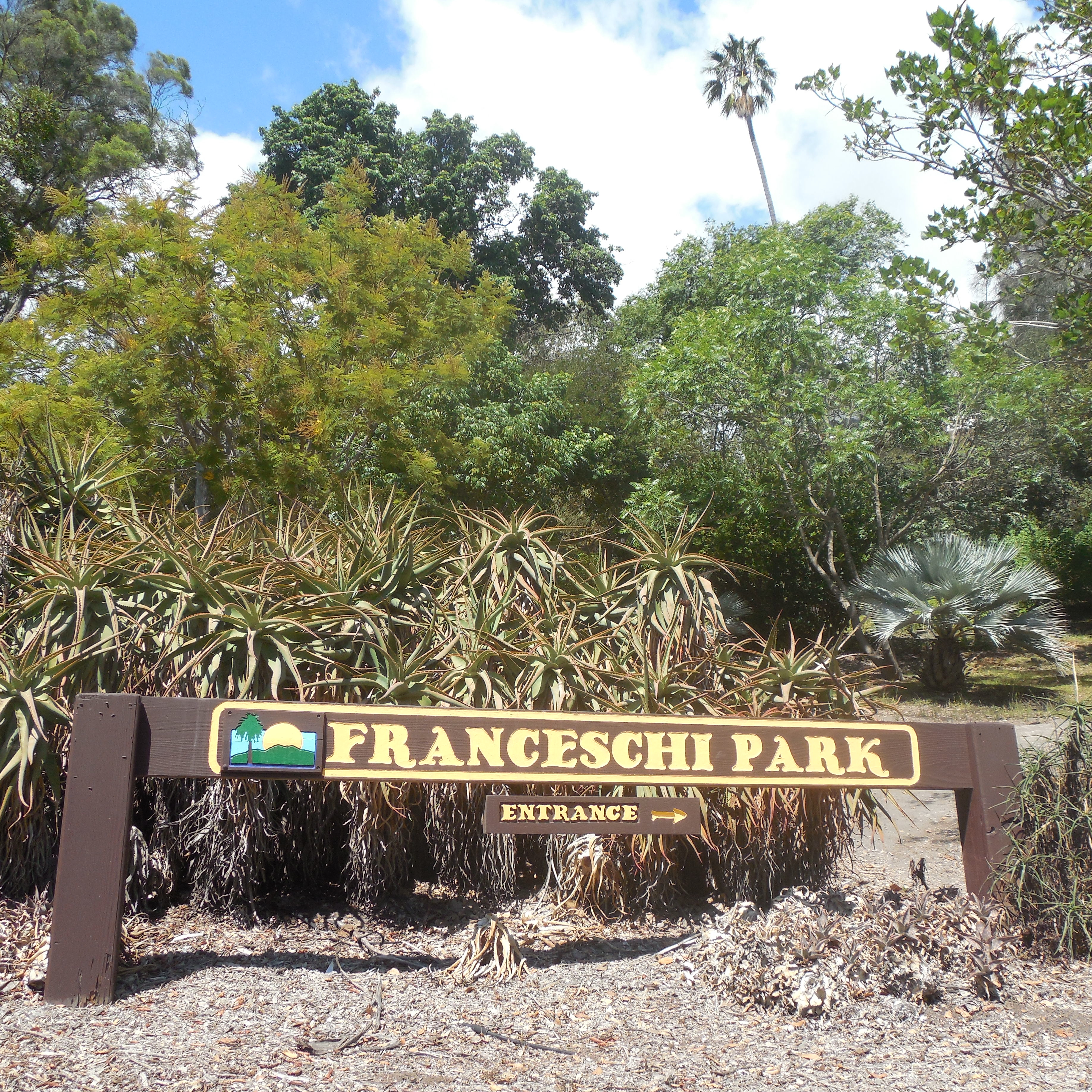 FranceschiPark1_20160916